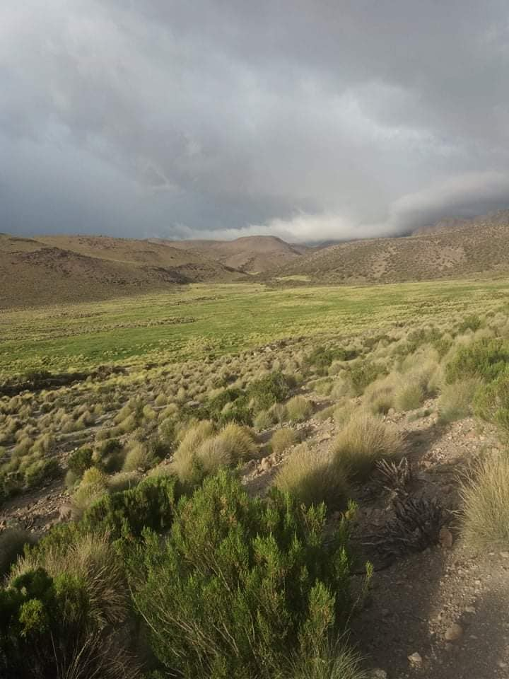 Bofedal Amparmalla, caserio Ancuta, pueblo Guallatire